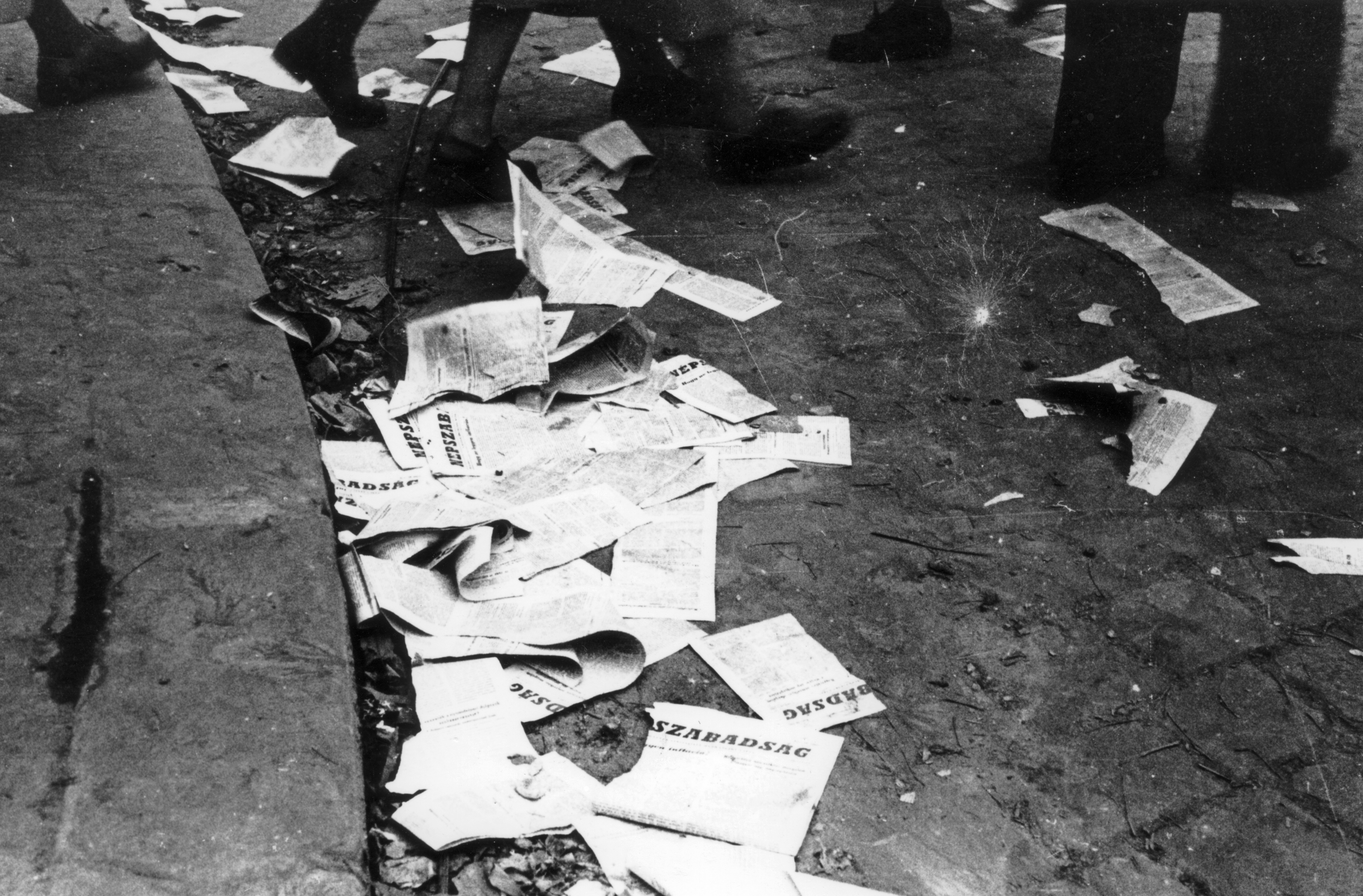 a Népszabadság 1956. november 13-i számának széttépett példányai. Location: Hungary, Budapest Tags: revolution, pavement, newspaper Title: a Népszabadság 1956. november 13-i számának széttépett példányai.